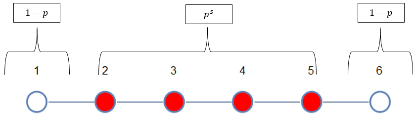 אשכול בגודל 4 בסריג חד מימדי להמחשה